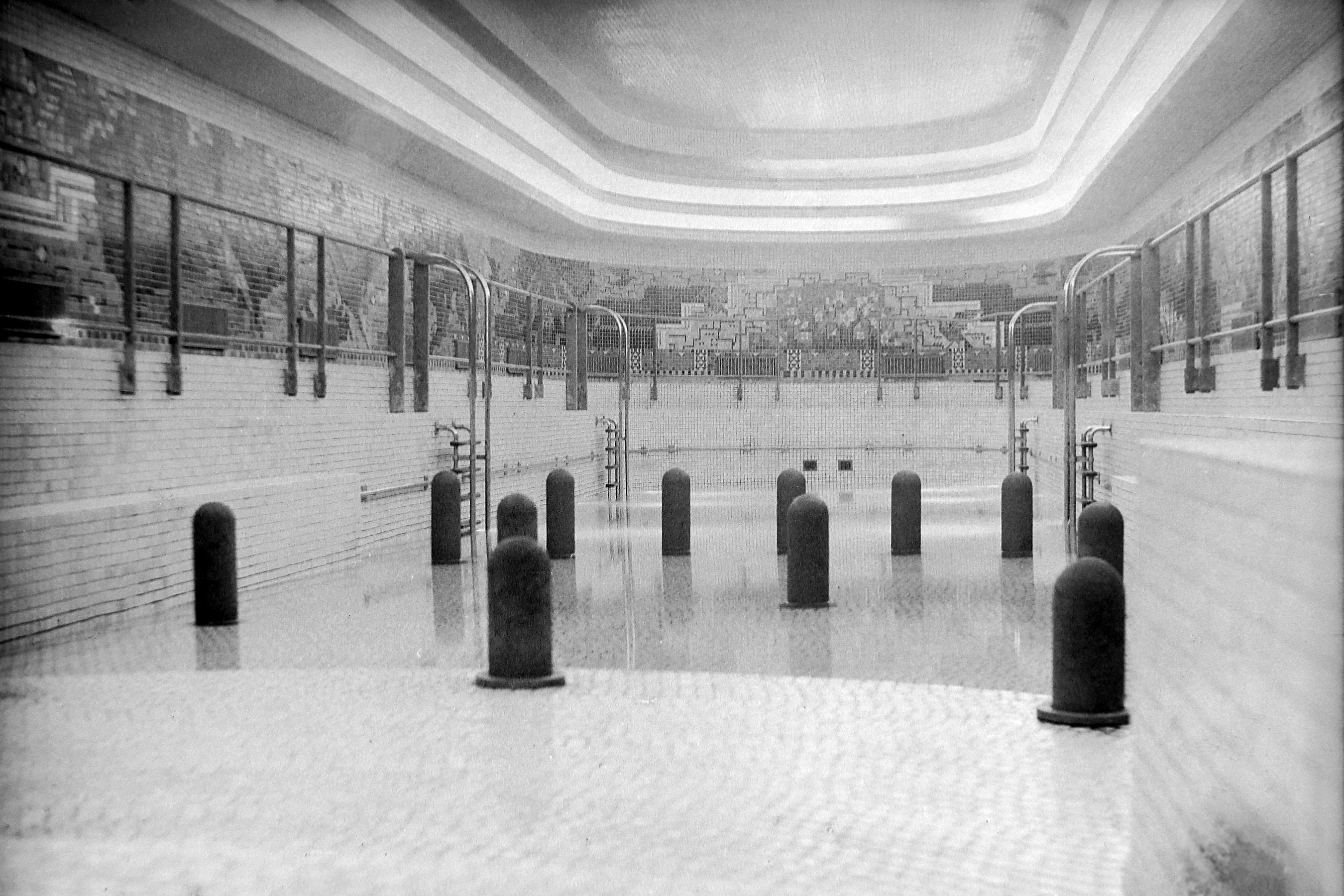 Piscine 1ère classe du paquebot Normandie